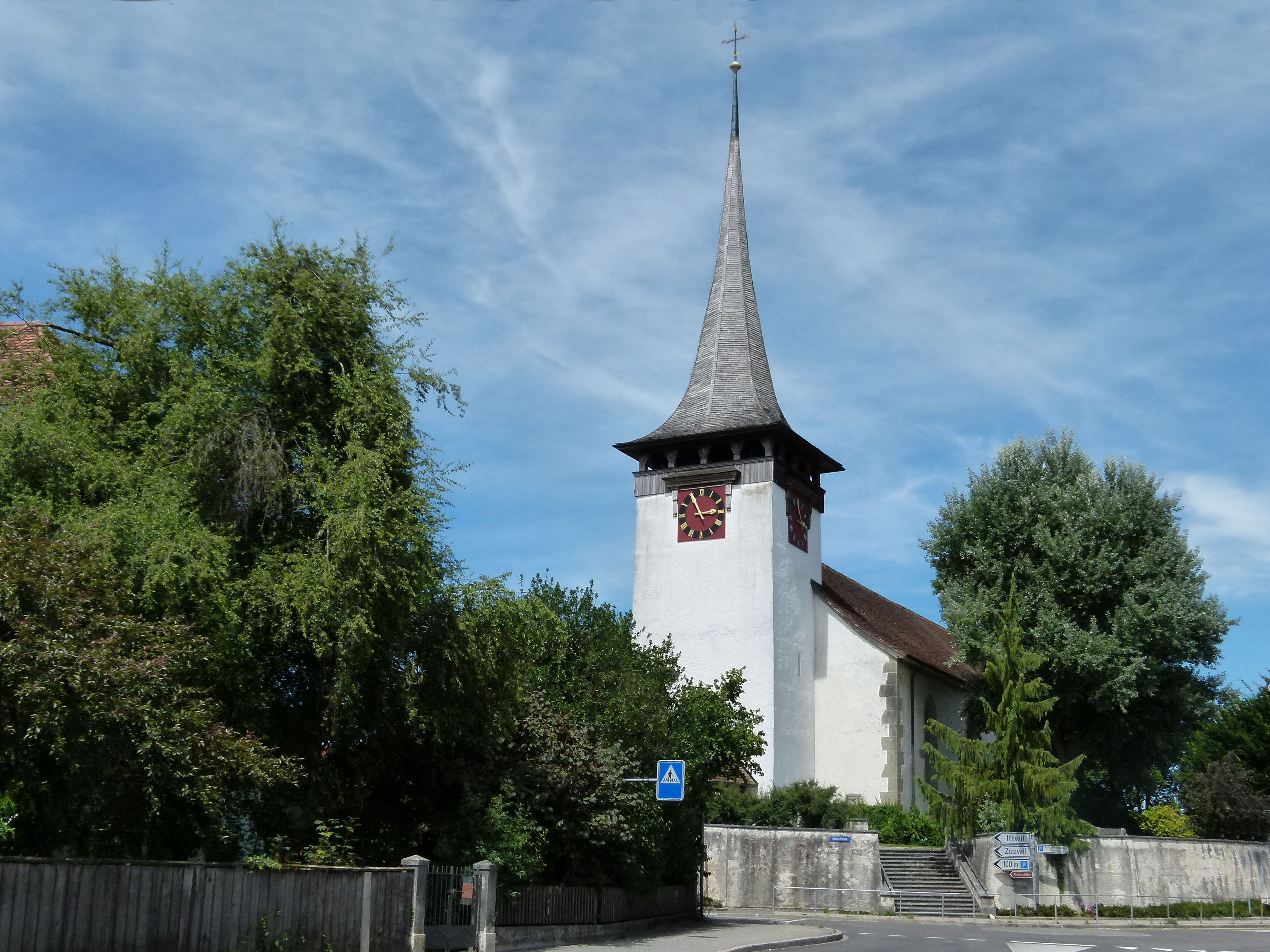 Kirche Jegenstorf von Südwest